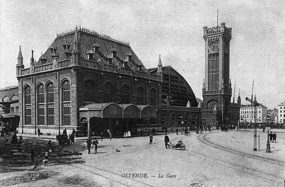 Le deuxième bâtiment voyageurs de la gare d'Ostende-Ville, détruit en 1956.